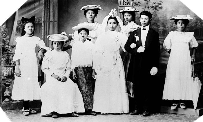 Repronegatief. Christelijk bruidspaar met familie en bruidsmeisjes te Menado